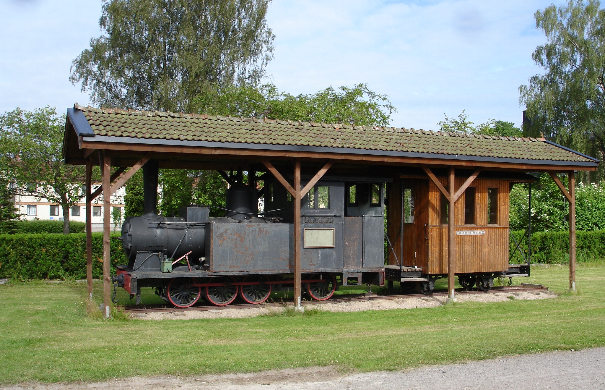 Museitåg i Strömsnäsbruk, trafikerat en sträcka till Delary.